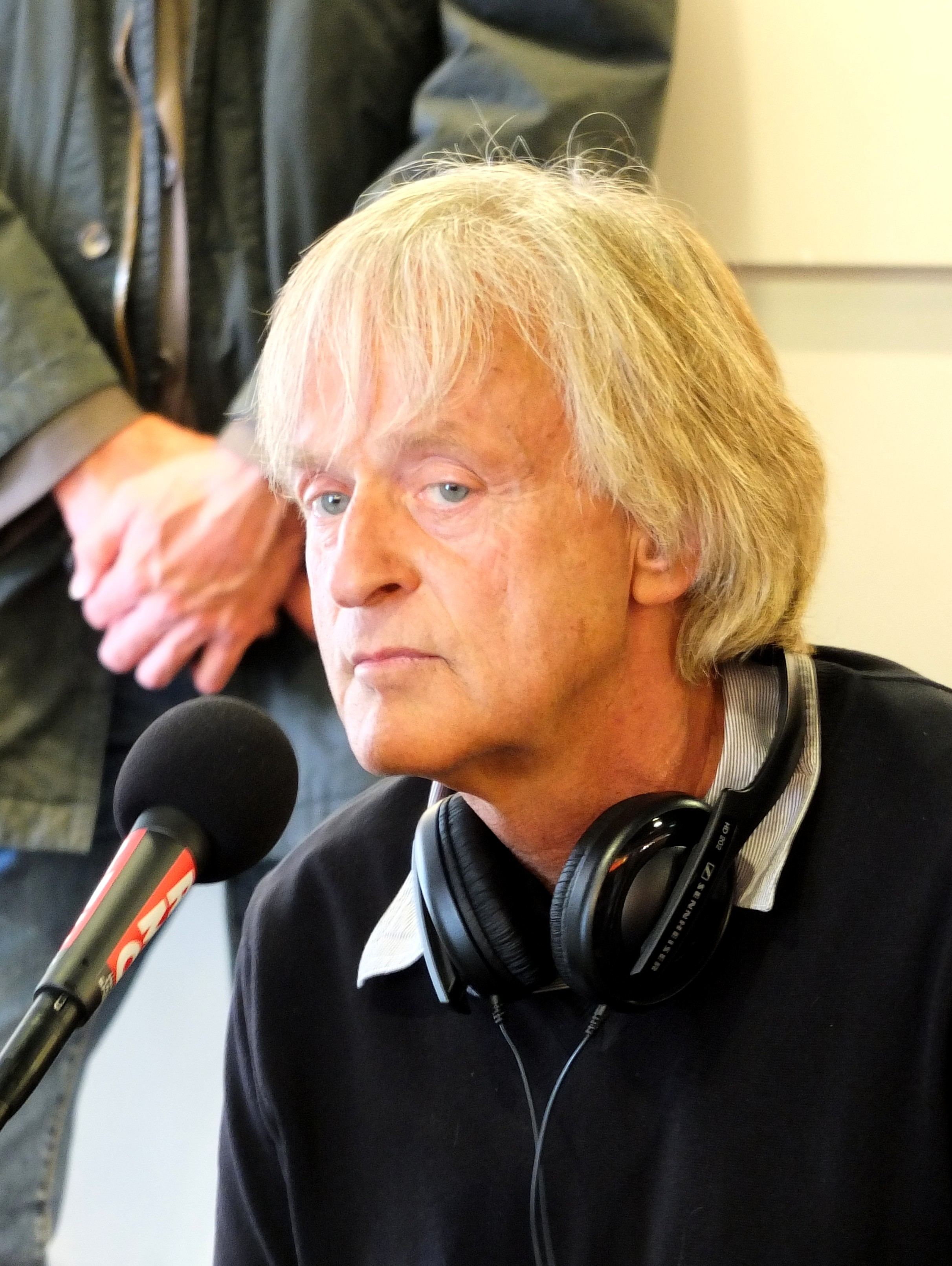 Le chanteur Dave présentant son livre J'irais bien refaire un tour, lors de la retransmission en direct de l'émission de RMC Les Grandes Gueules depuis la FNAC La Défense (Paris), le 5 octobre 2012.